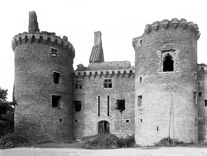 Entrée (façade est) du château de Suscinio par Lefèvre-Pontalis.